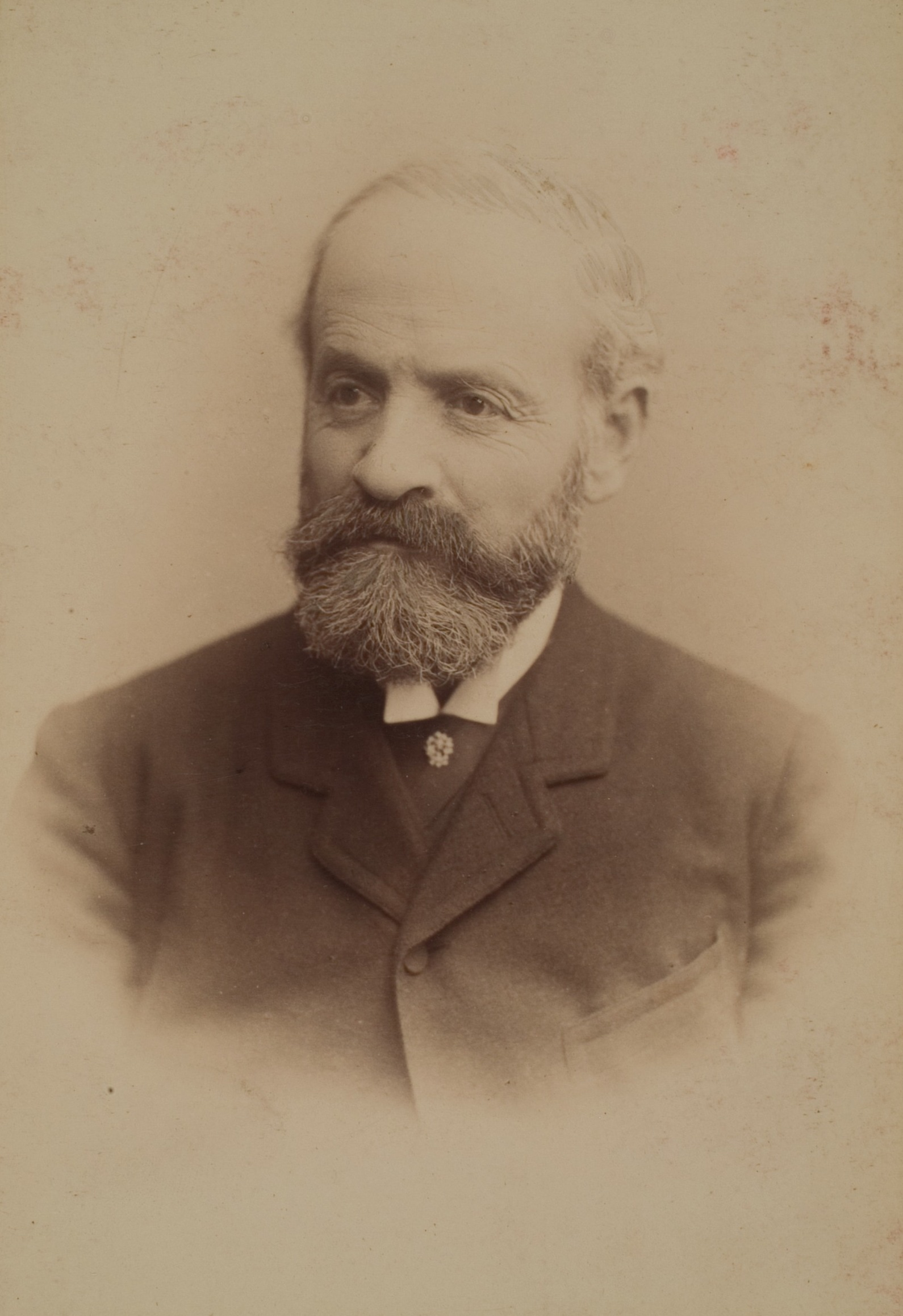 Salomon Moos, Arzt (Ohrenheilkunde), 1866–1895 Professor in Heidelberg